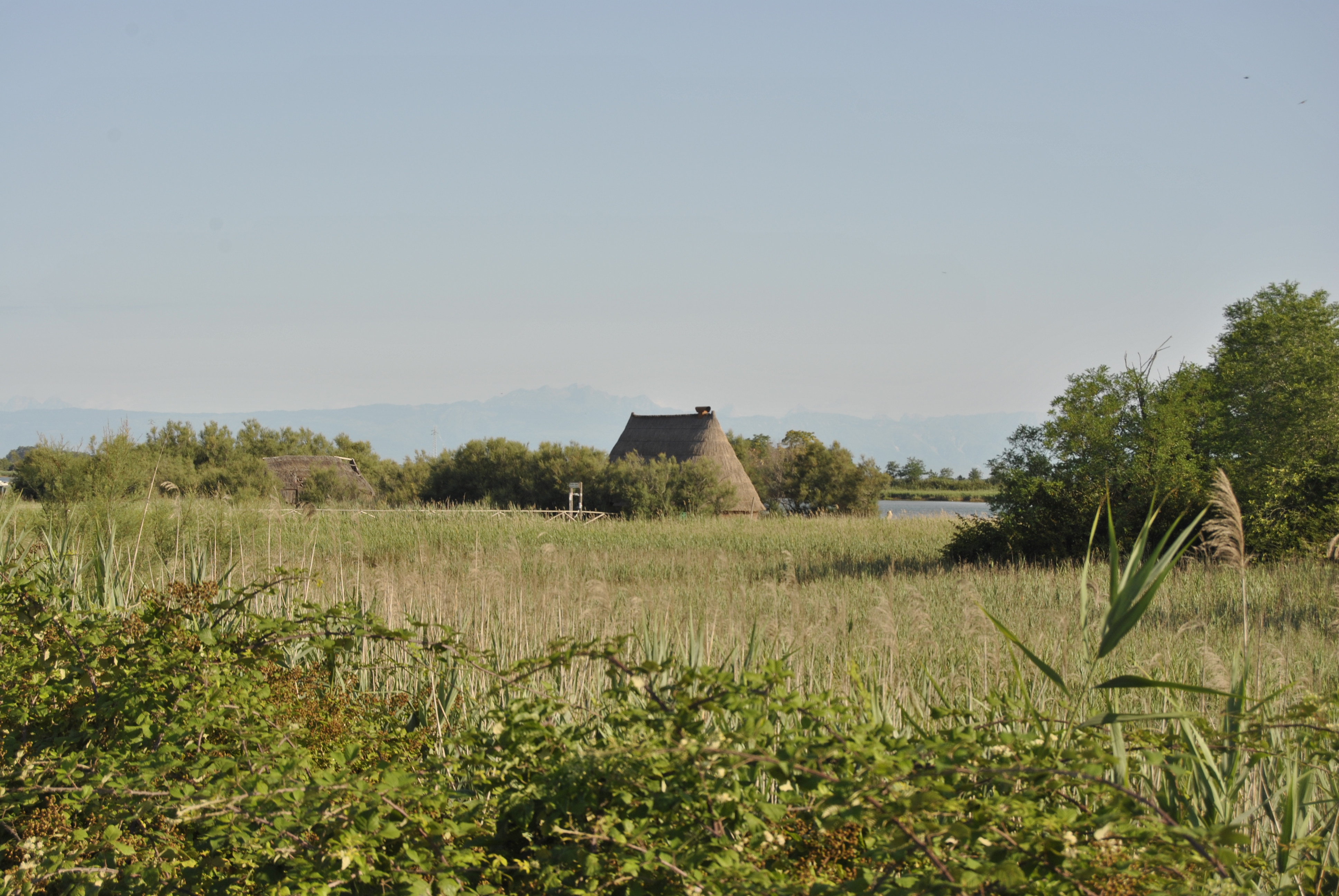 Paesaggio con Casone, Laguna di Caorle, Venezia